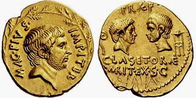 Aureus des Sextus Pompeius, 42-40 v. Chr. geprägt in Sizilien (8,17g 8h); Vorderseite mit Porträt des Sextus Pompeius im Kranz aus Eichenlaub und Aufschrift MAG(ni filius) PIUS IMP(erator) ITER. Revers mit Aufschrift PRAEF(ectus) CLAS(sis) ET ORAE MARIT(imae) EX S(enatus) C(onsulto) und Profilen des verstorbenen Vaters Gnaeus Pompeius Magnus links und des verstorbenen Bruders Gnaeus Pompeius der Jüngere rechts. Links außen ein Lituus, rechts außen ein Dreifuß. Sammlerwert etwa 70.000 bis 75.000 USD. Abbildung mit Genehmigung der Classical Numismatic Group, Inc.